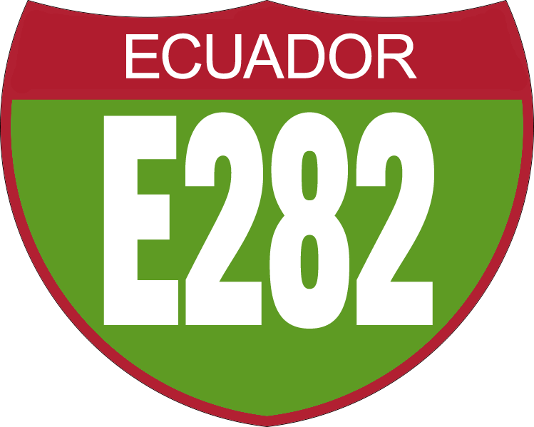 Disco de Identificación Ruta E282